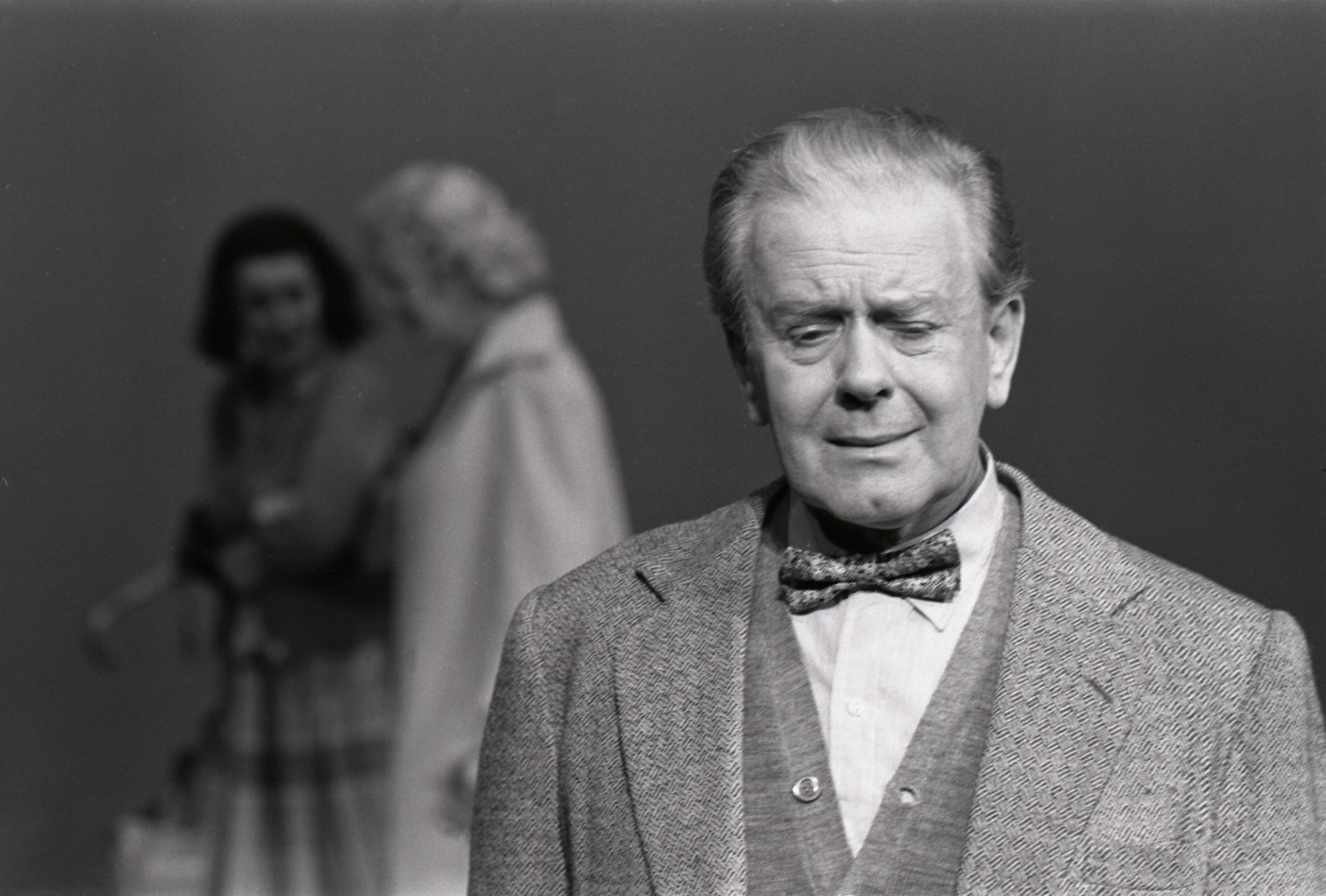 Scene fra Nationaltheaterets oppsetning av David Storeys "Hjem". Nærbilde av Harry med Majorie og Kathleen gående i bakgrunnen. Forestillingen hadde premiere 27. oktober 1971. Kirsten Sørlie hadde regi og medvirkende var Per Aabel som Harry, Stein Grieg Halvorsen som Jack, Ella Hval som Marjorie, Aase Bye som Katleen og Nils Ole Oftebro som Alfred. Stykket, som utspiller seg på et mentalsykehus, står i den absurdiske tradisjonen etter Samuel Beckett. "Hjem" fikk svært god mottagelse og ble senere oppført i Fjernsynsteateret. Oslo